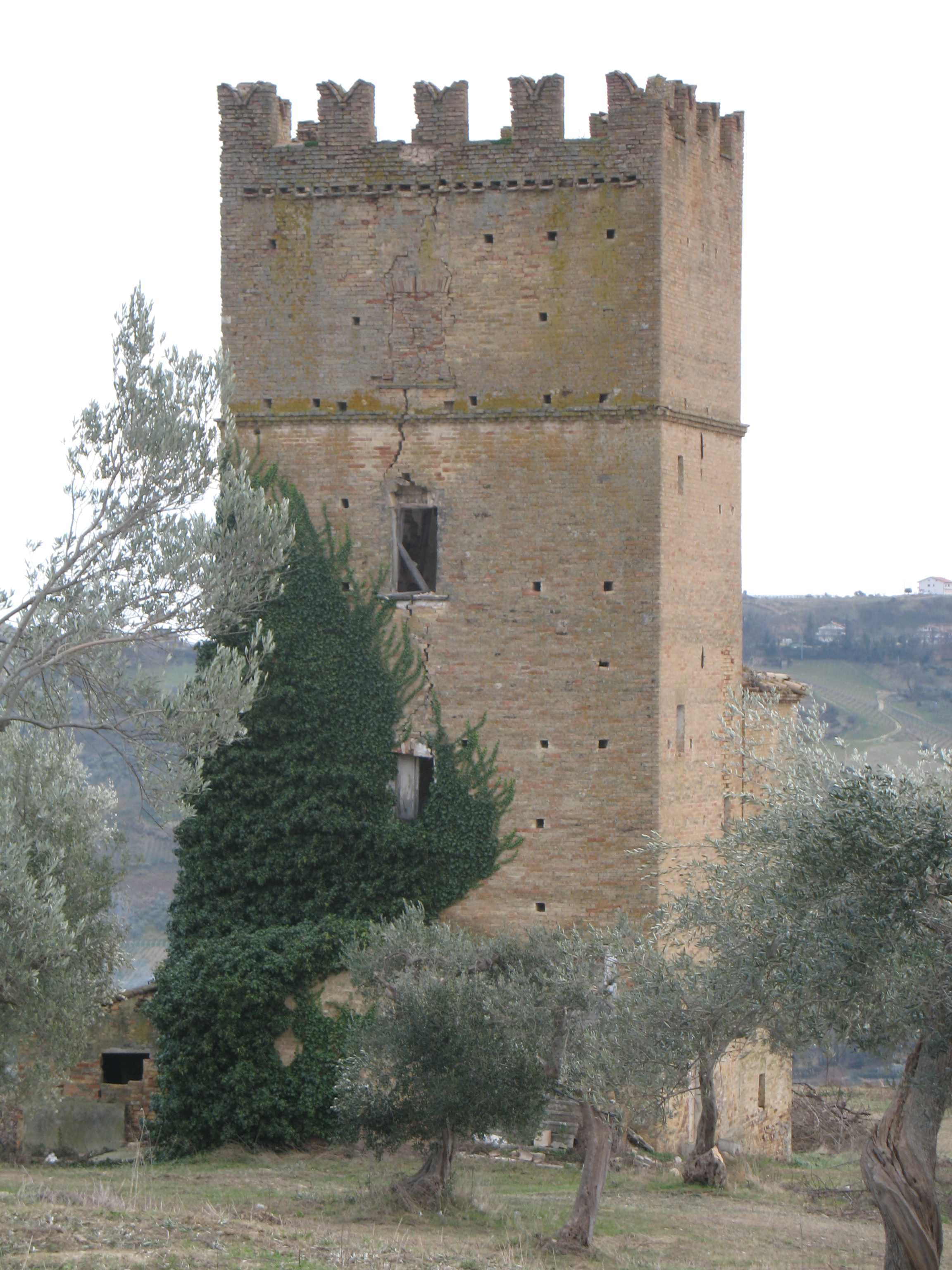 La torre dell’antica famiglia teatina Anelli-Fieramosca costruita in laterizio